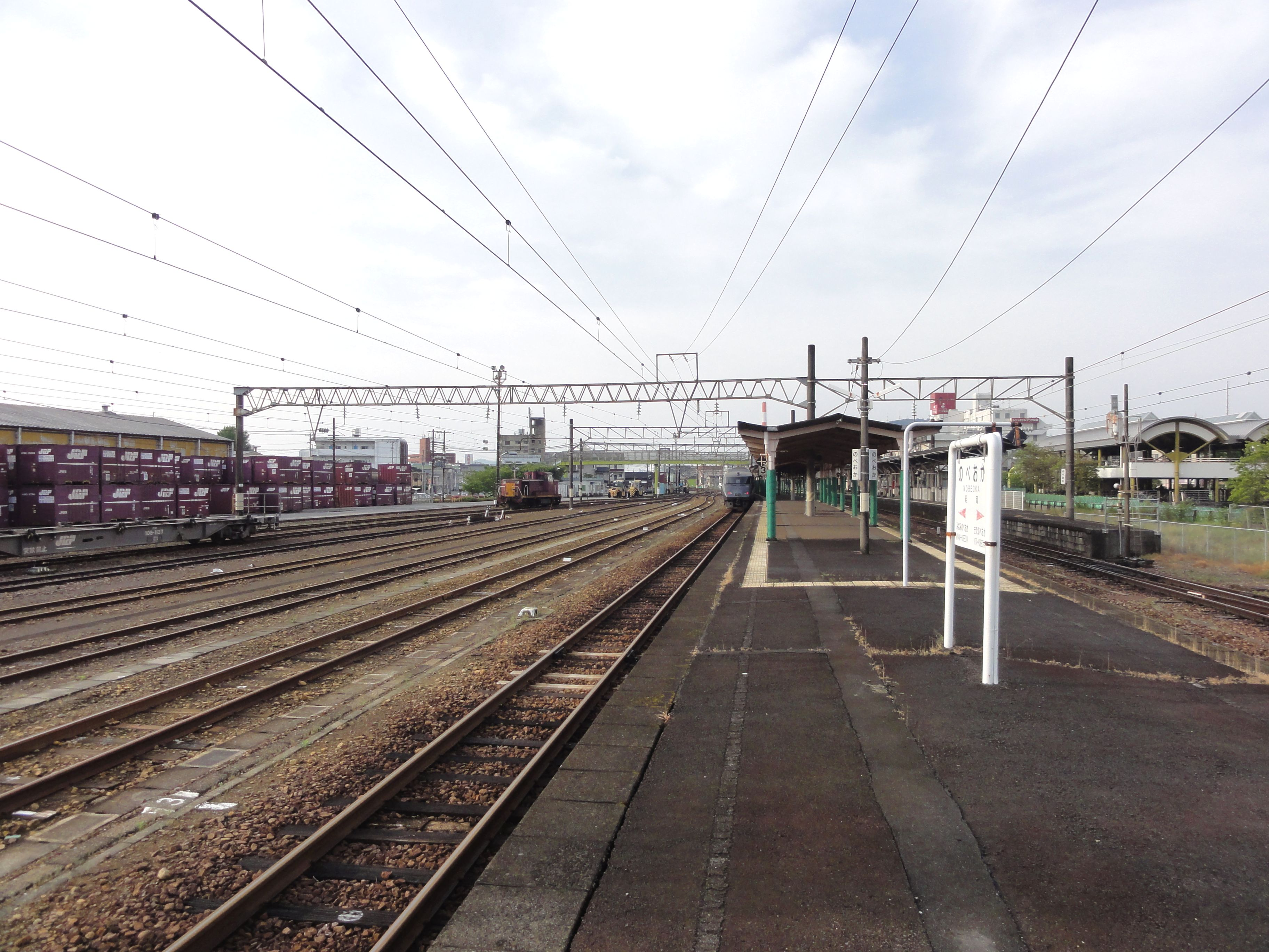 JR延岡駅ホーム